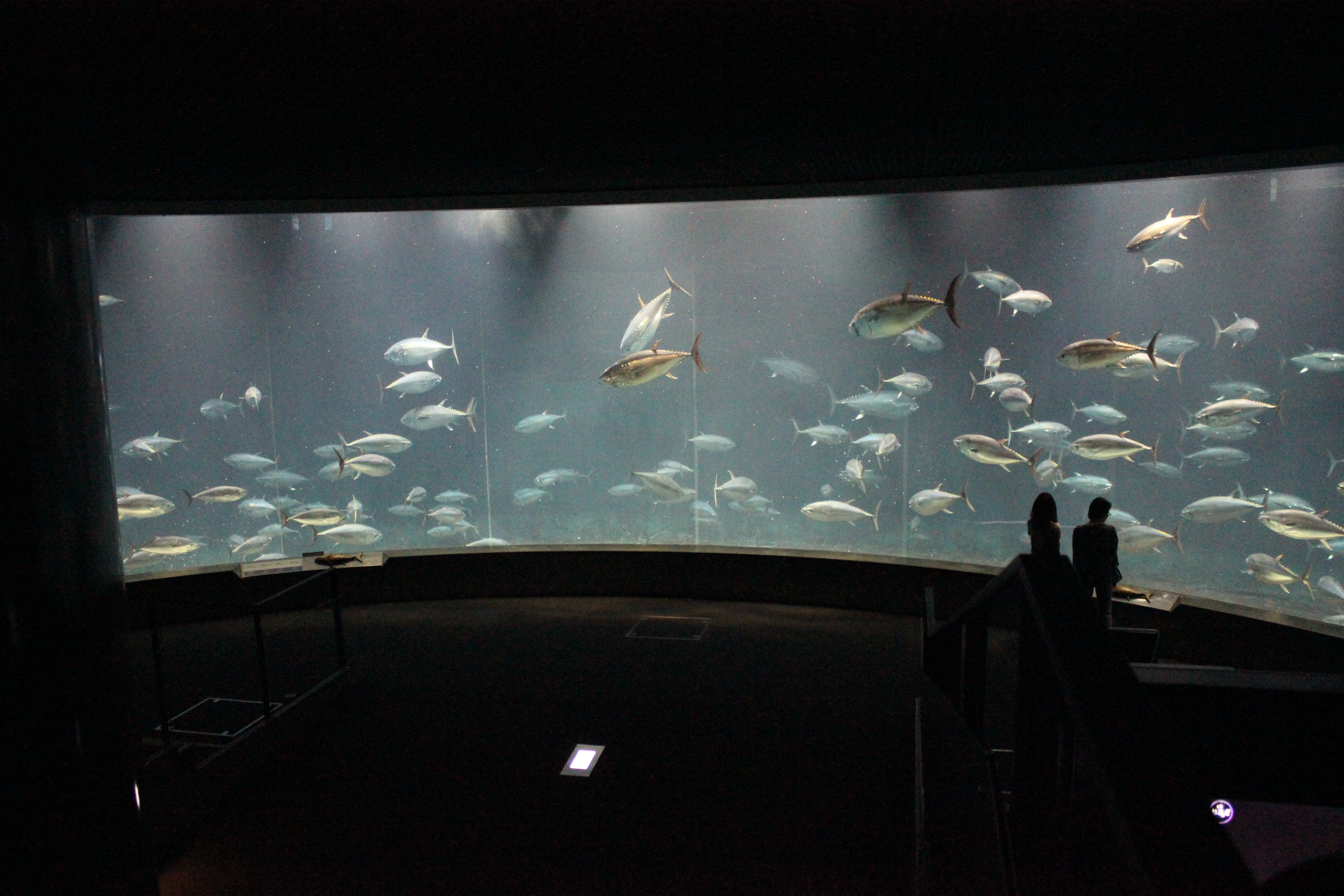 Tuna Tank